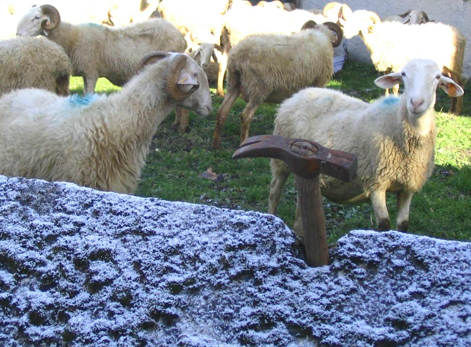 Troupeaux en Vallée d'Ossau - Pyrénées Atlantiques - France Flock of sheeps in the French Pyrenees. Auteur/author: P.Charpiat - 2005